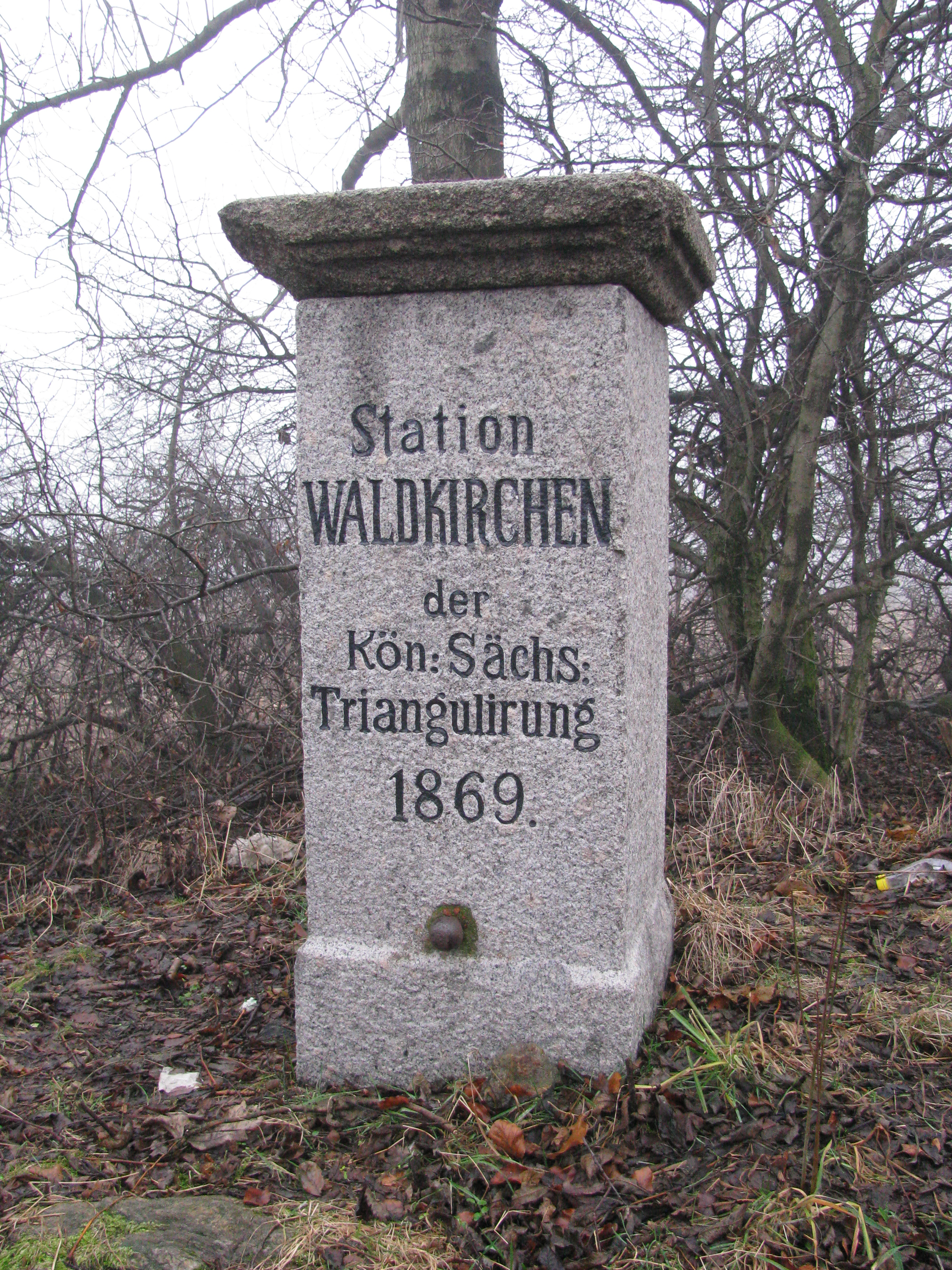 Station 90 der Königlich-Sächsischen Triangulation von 1869, Ullmanns Kuppe, Waldkirchen im Erzgebirge